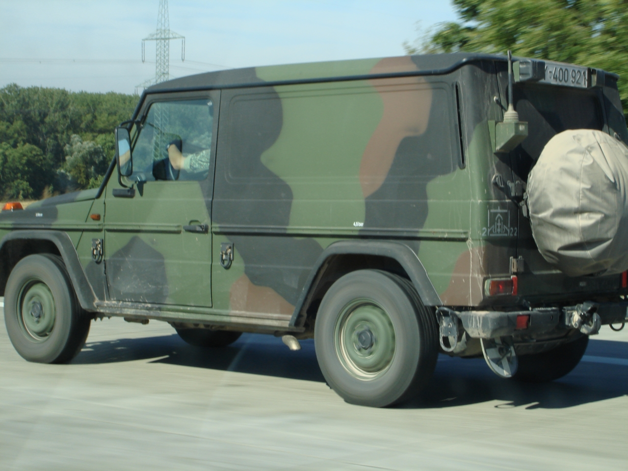 Mercedes Benz Wolf mit Hardtop, Ausführung Luftlande und mit Rüstsatz Funk. Seitlich die Verzurösen. Das Fahrzeug gehört zur 2./ Kompanie der Flugabwehrraketengruppe 22 (Patriot-Kampfstaffel) aus Penzing. Hinten links über dem taktischen Kennzeichen der Antennenfuß für das Funkgerät. Ebenfalls beachtlich der Hohe Luftdruck der Reifen. Vorne 3,5 bar, hinten 4,5 bar.